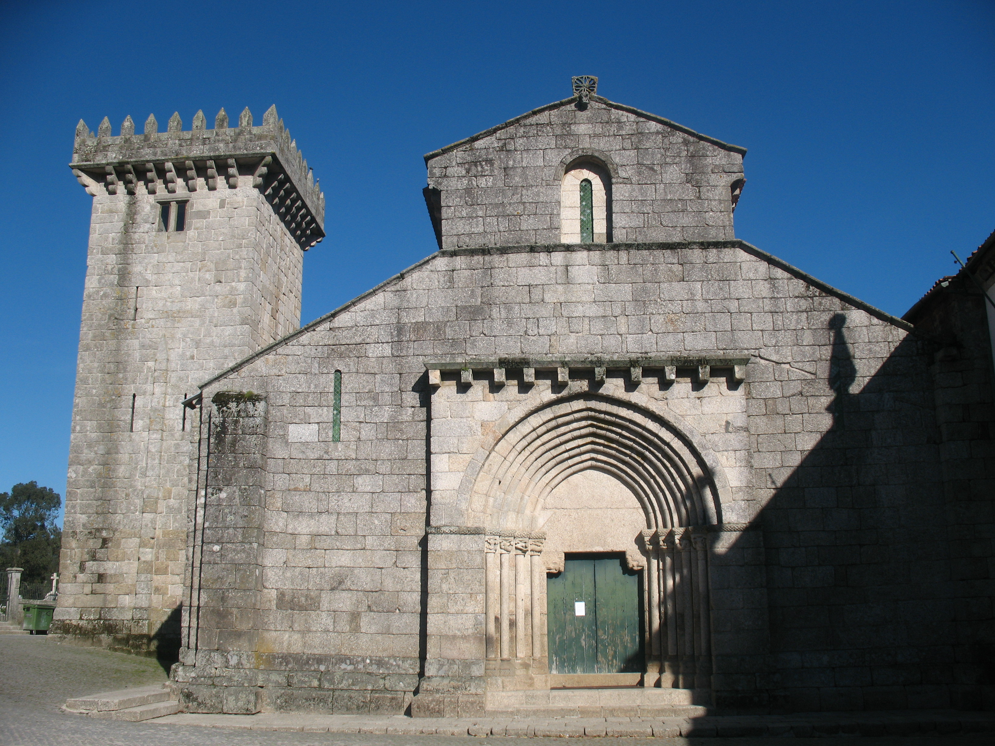 Amarante Igreja Românica de Travanca